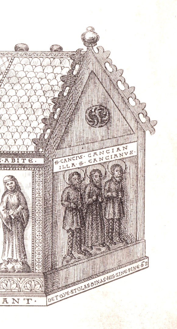 Historische Zeichnung des Epiphaniusschreins im Hildesheimer Dom, Detail: Schmalseite mit den hll. Cantius, Cantianus und Cantianilla